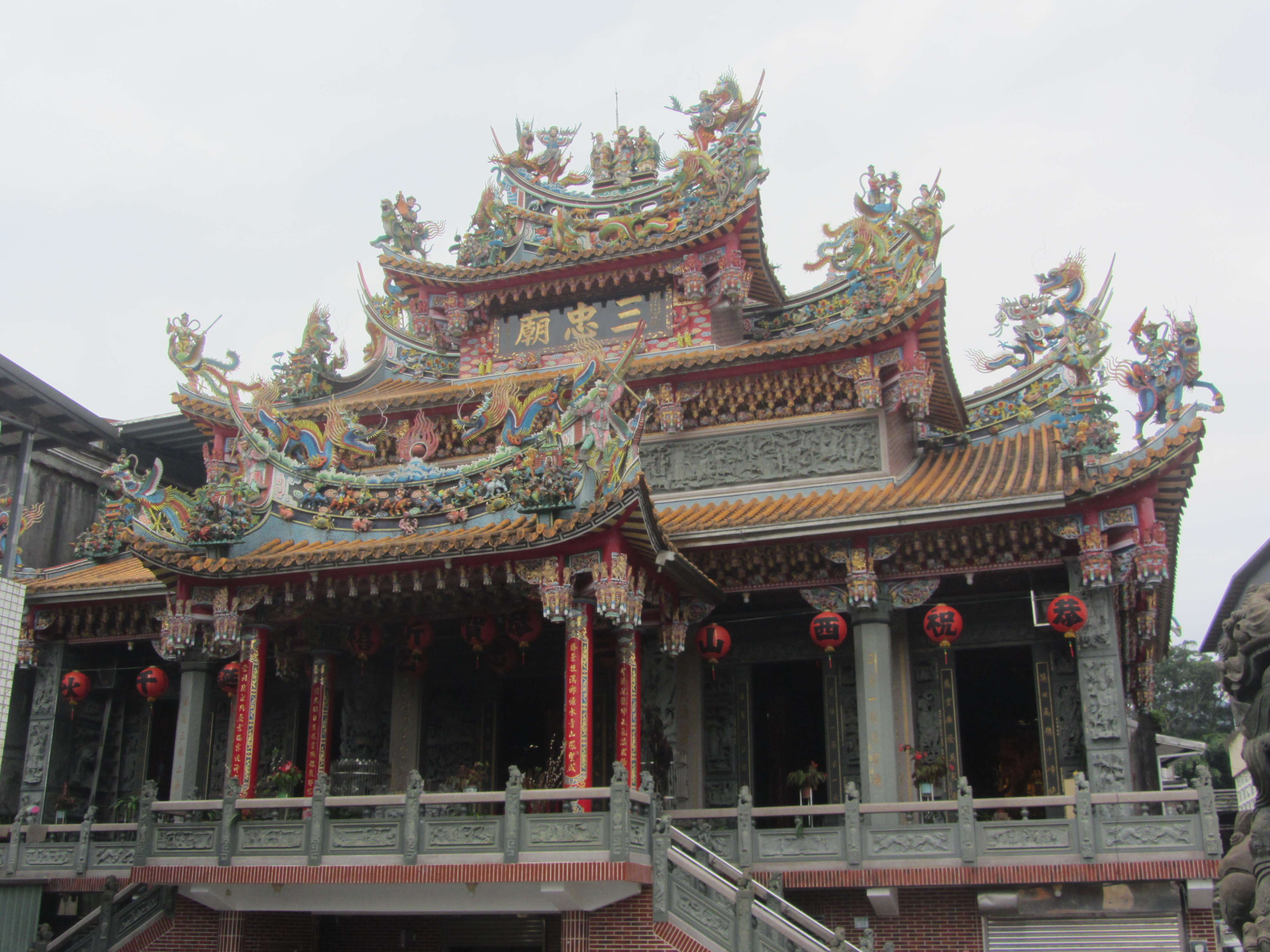 雙溪三忠廟，台灣唯一供奉文天祥、陸秀夫、張世傑「宋末三傑」的廟宇。